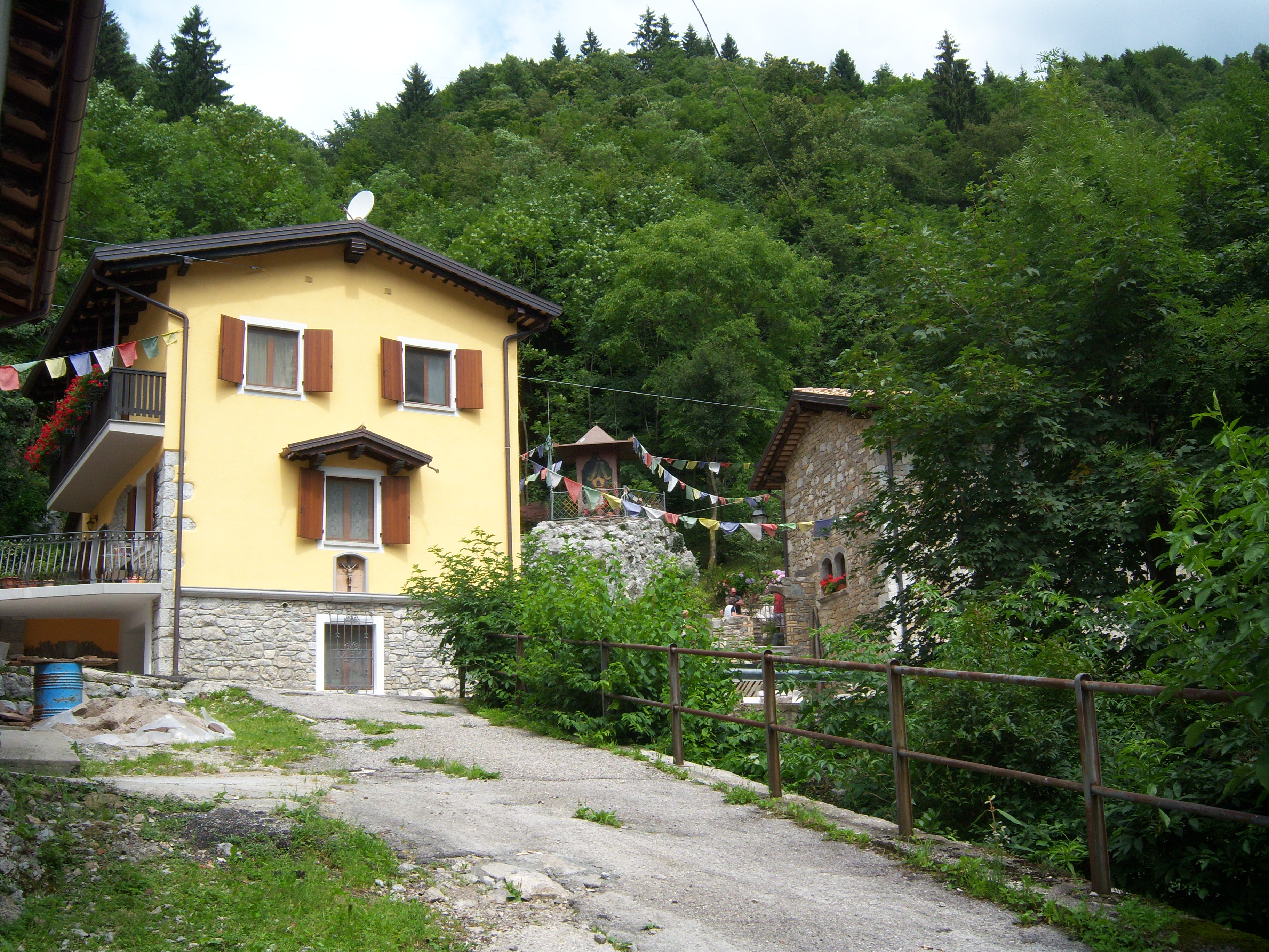 POLAVA un pezzo di Tibet in Benecia